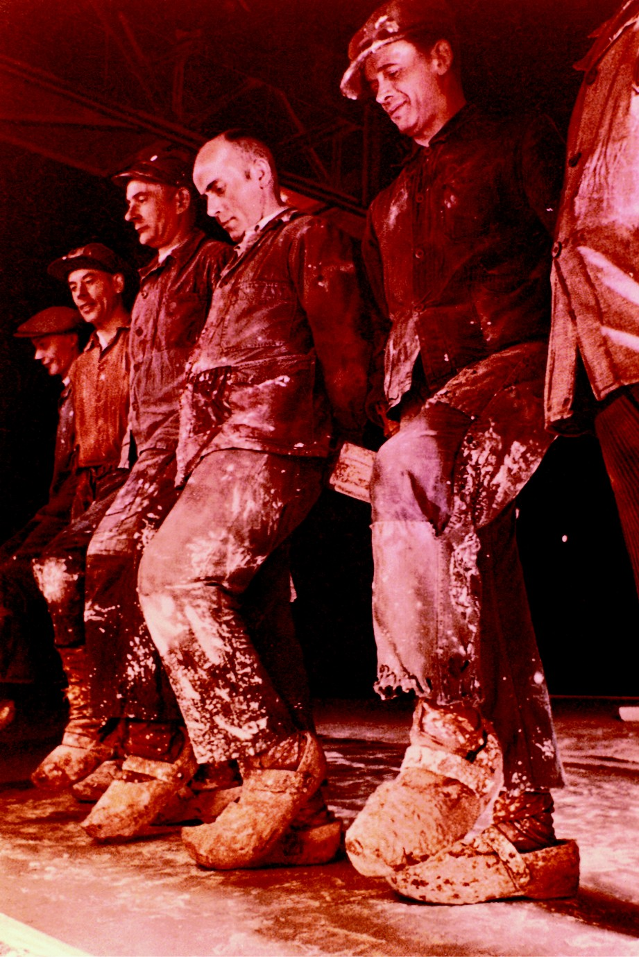 Glastänzer: Vorbereitung des Poliervorgangs in der industriellen Glasfertigung um 1920 durch Arbeiter mit Holzschuhen